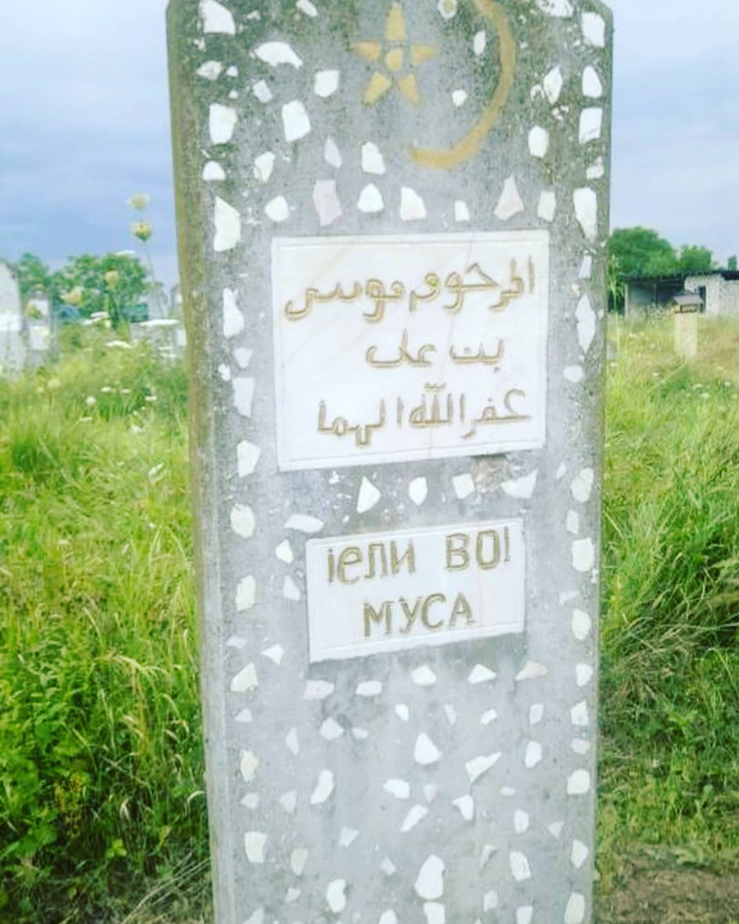 Нохчийн: Ӏеле воӀ Муса